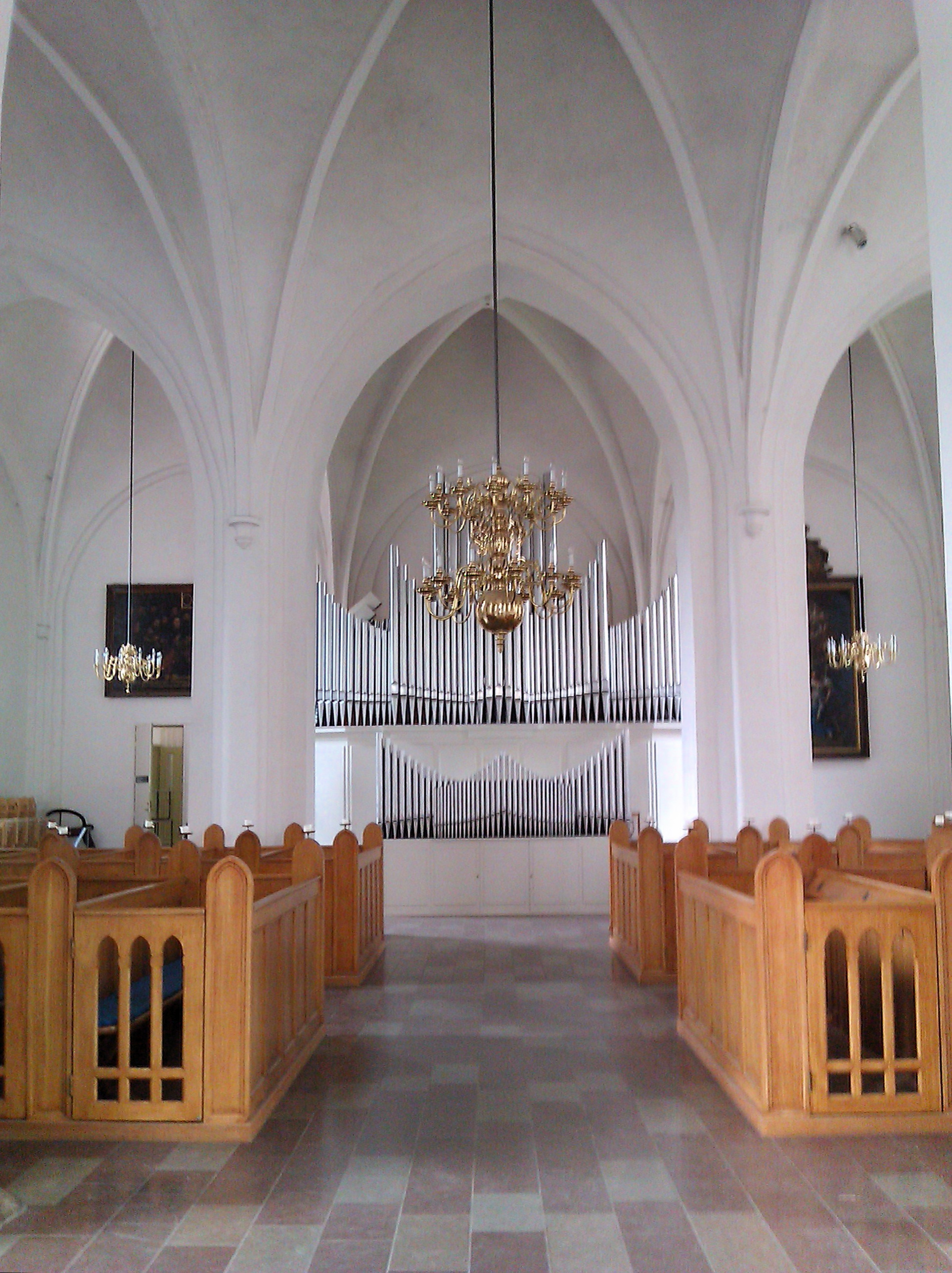 Interiør med stolestader og orgel, Sankt Petri Kirke, København